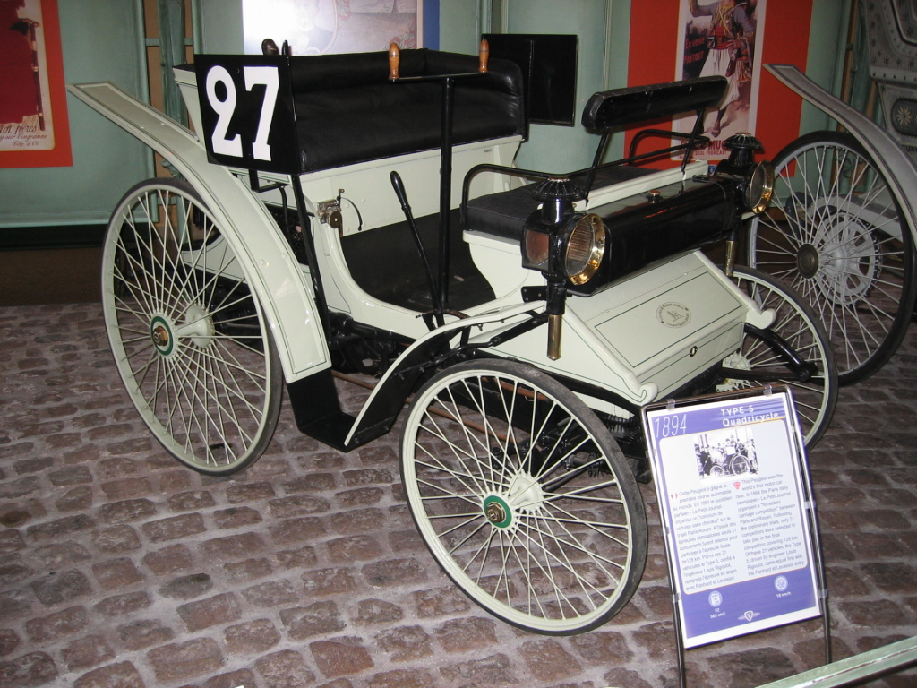 Peugeot Type 5 de 1893 - Musée Peugeot Sochaux